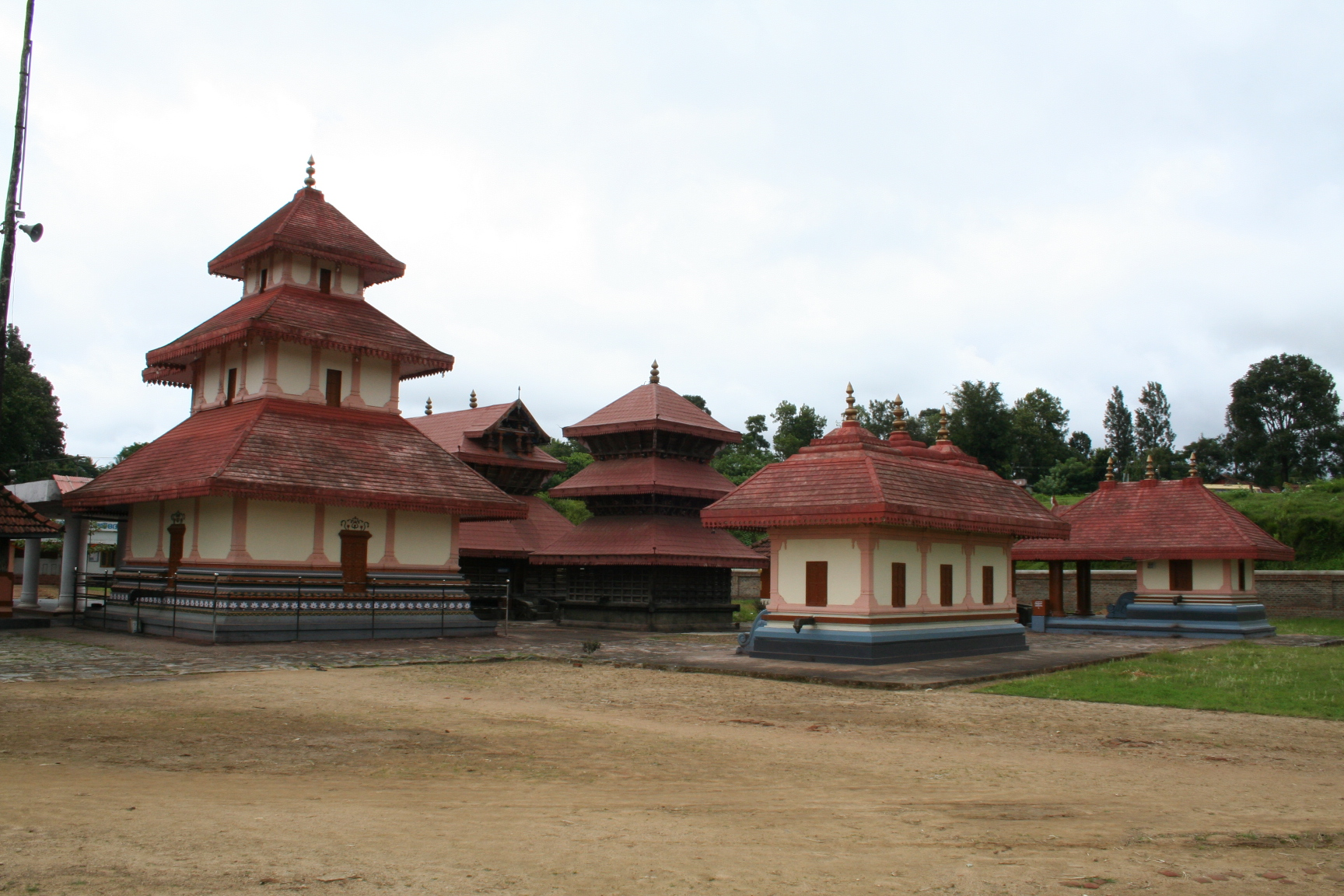 Seetha Lava Kusha - waynad